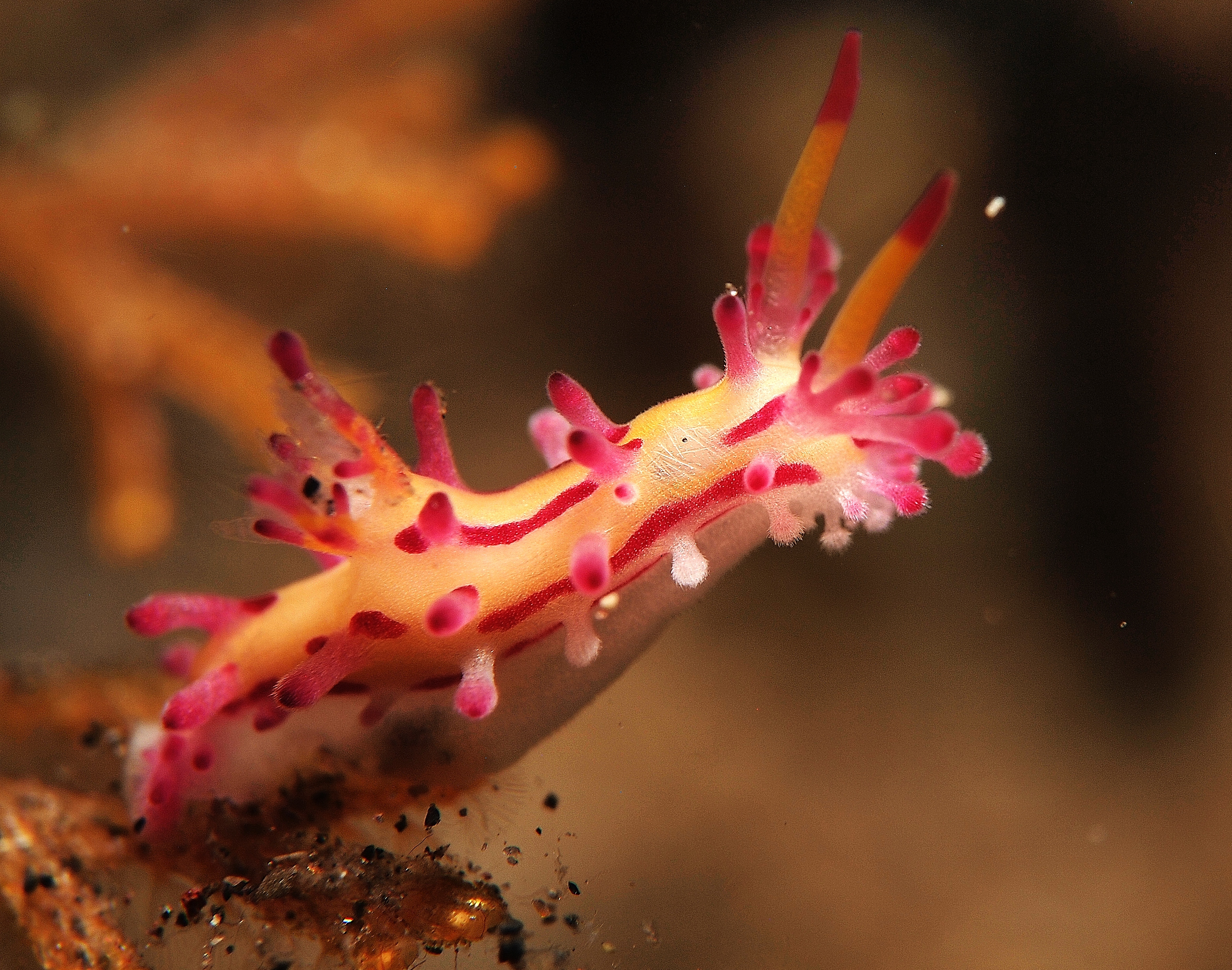 Aegires villosus, Bali, Indonesia